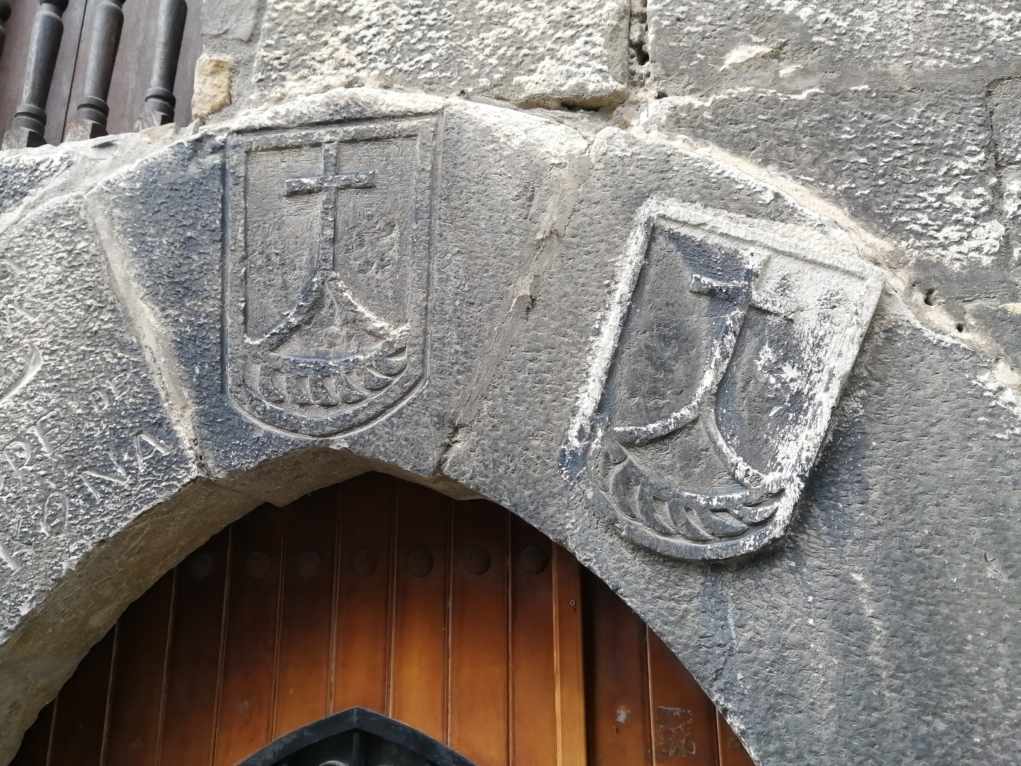 Ondarroako Likona dorreko armarriak